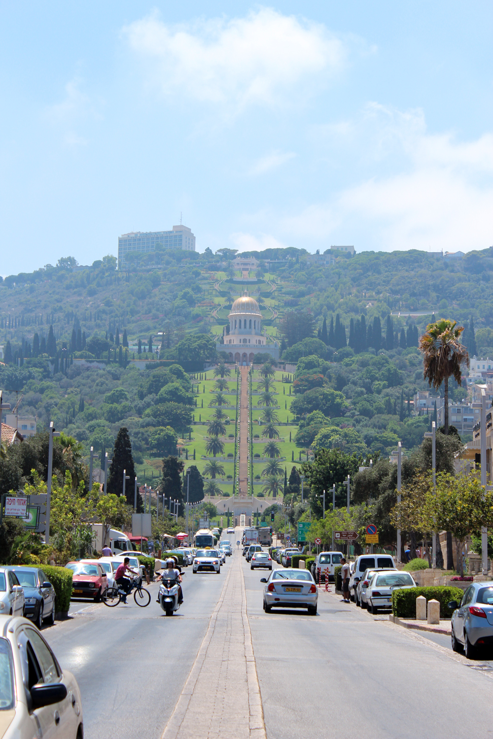 Haifa, Israel Haifa